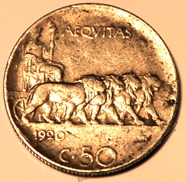 Rovescio di una monete, serie impero, del 1920, da 50 centesimi di lira. Coniata a Roma. Presenta la biga trainata dai leoni.